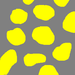 Ensemble de particules individuelles (jaune)